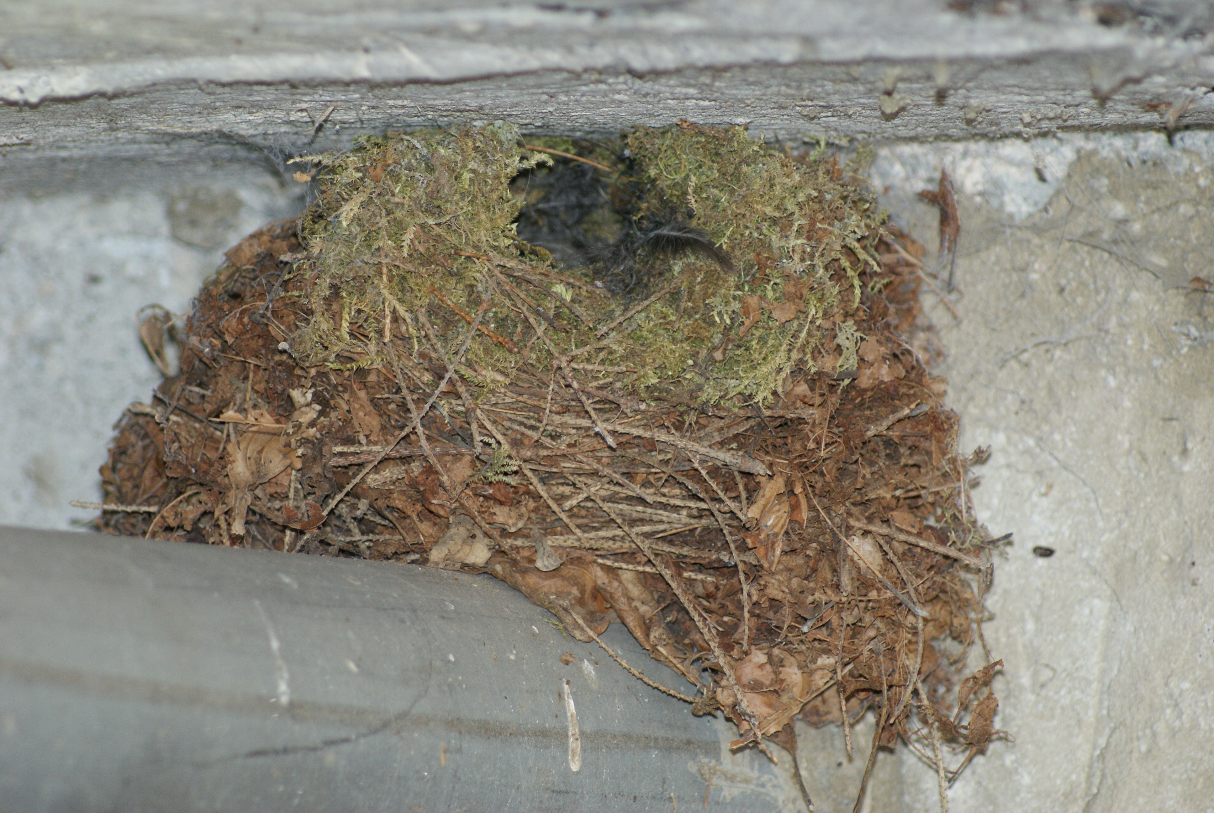 Nest der Wasseramsel (Cinclus cinclus) unter einer Brücke in der Gemeinde Wädenswil, Kanton Zürich, Schweiz.